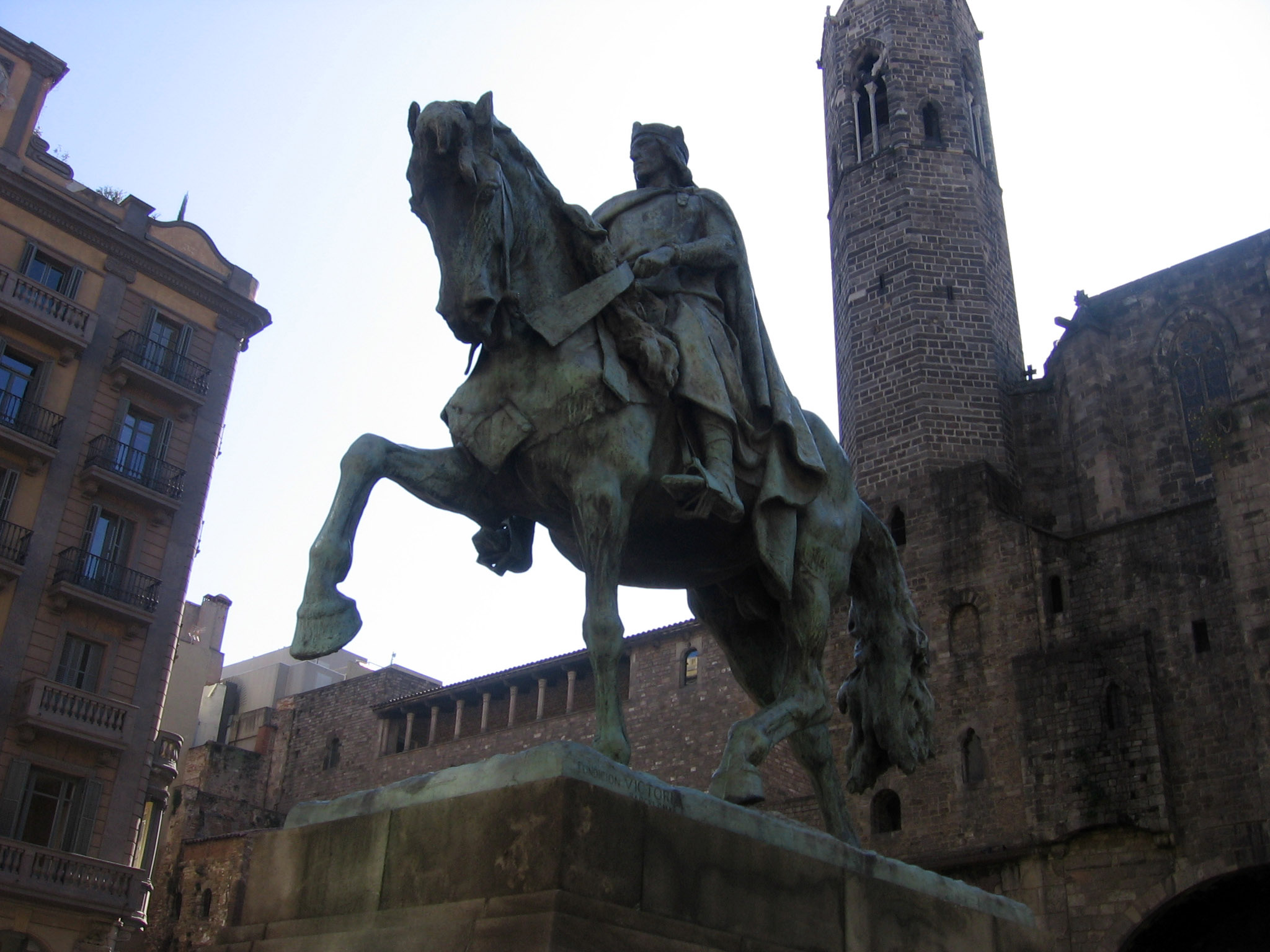 Ramon Berenguer III el Grande, de Josep Llimona.